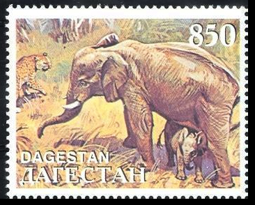 Фантастическо-спекулятивная марка, выпущенная от имени Дагестана